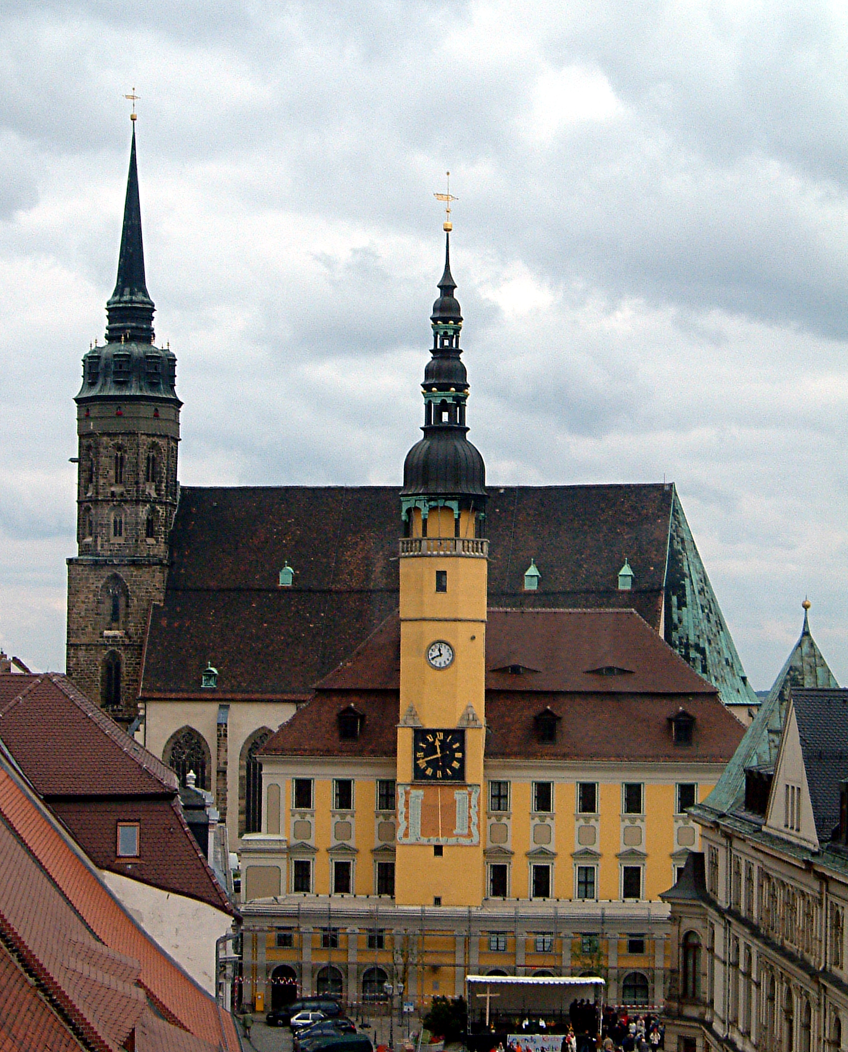 Bautzen: Blick vom Lauenturm auf den_Dom_St_Petri (davor das (gelbe) Rathaus)